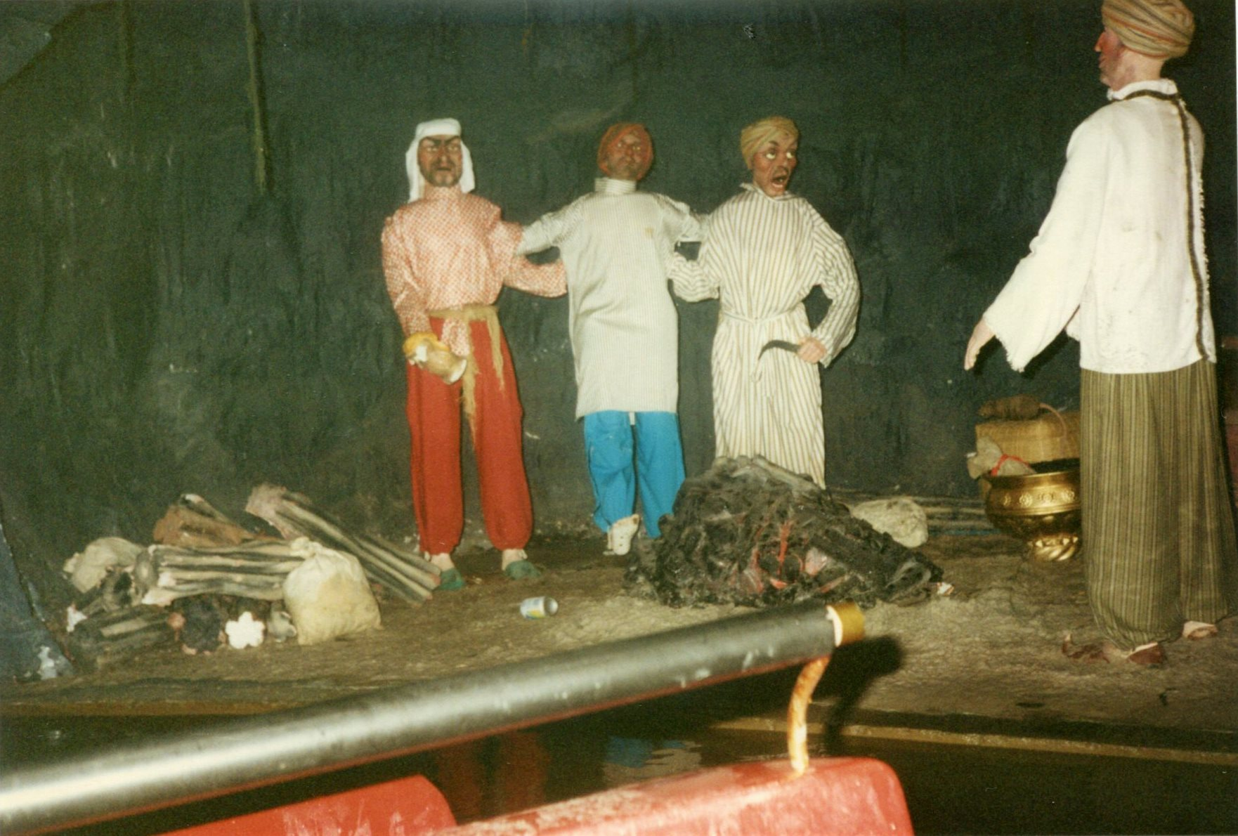 WalibiAlibaba